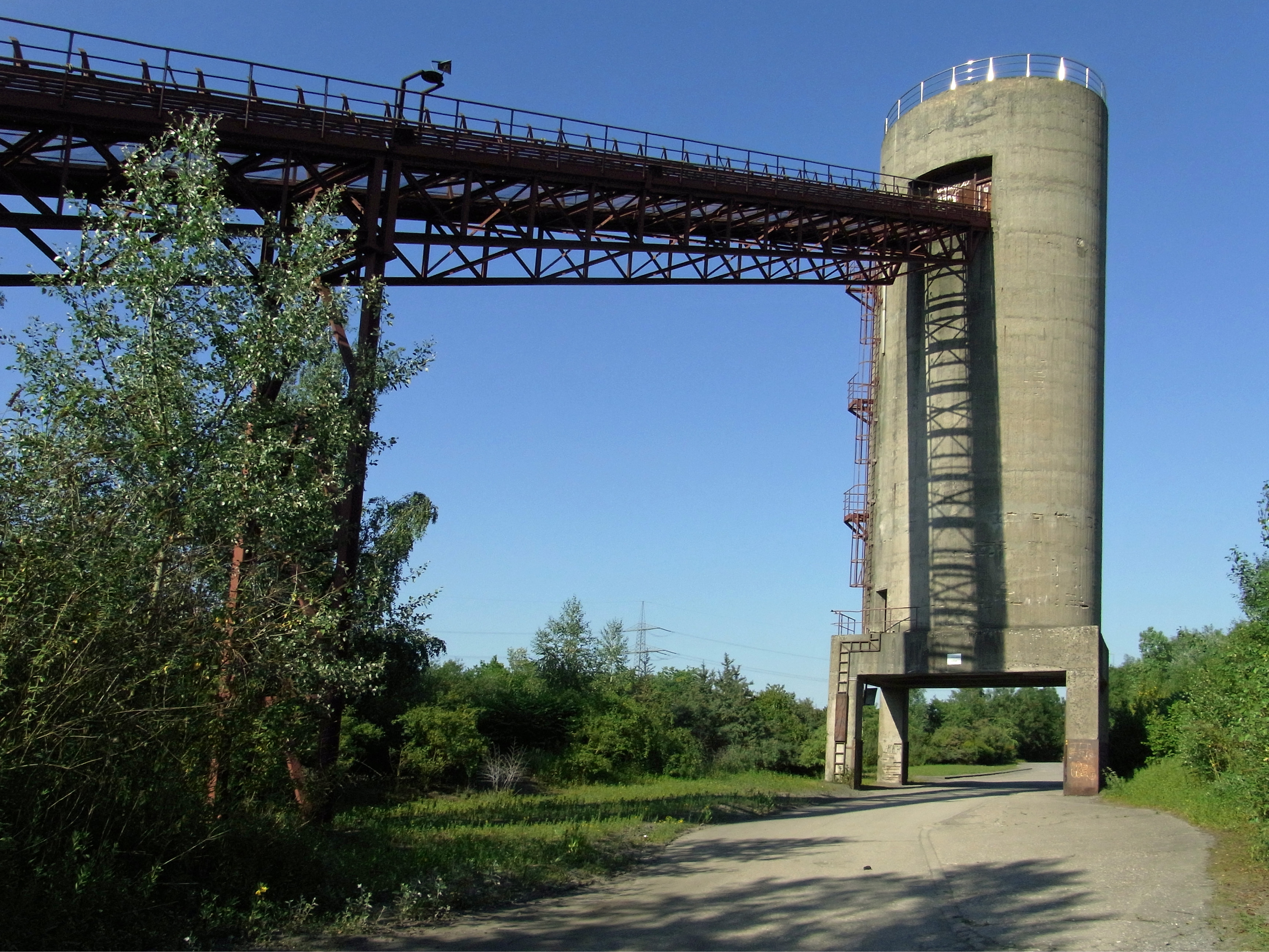 Emscherkunst.2010 Ayşe Erkmen: Turm 79